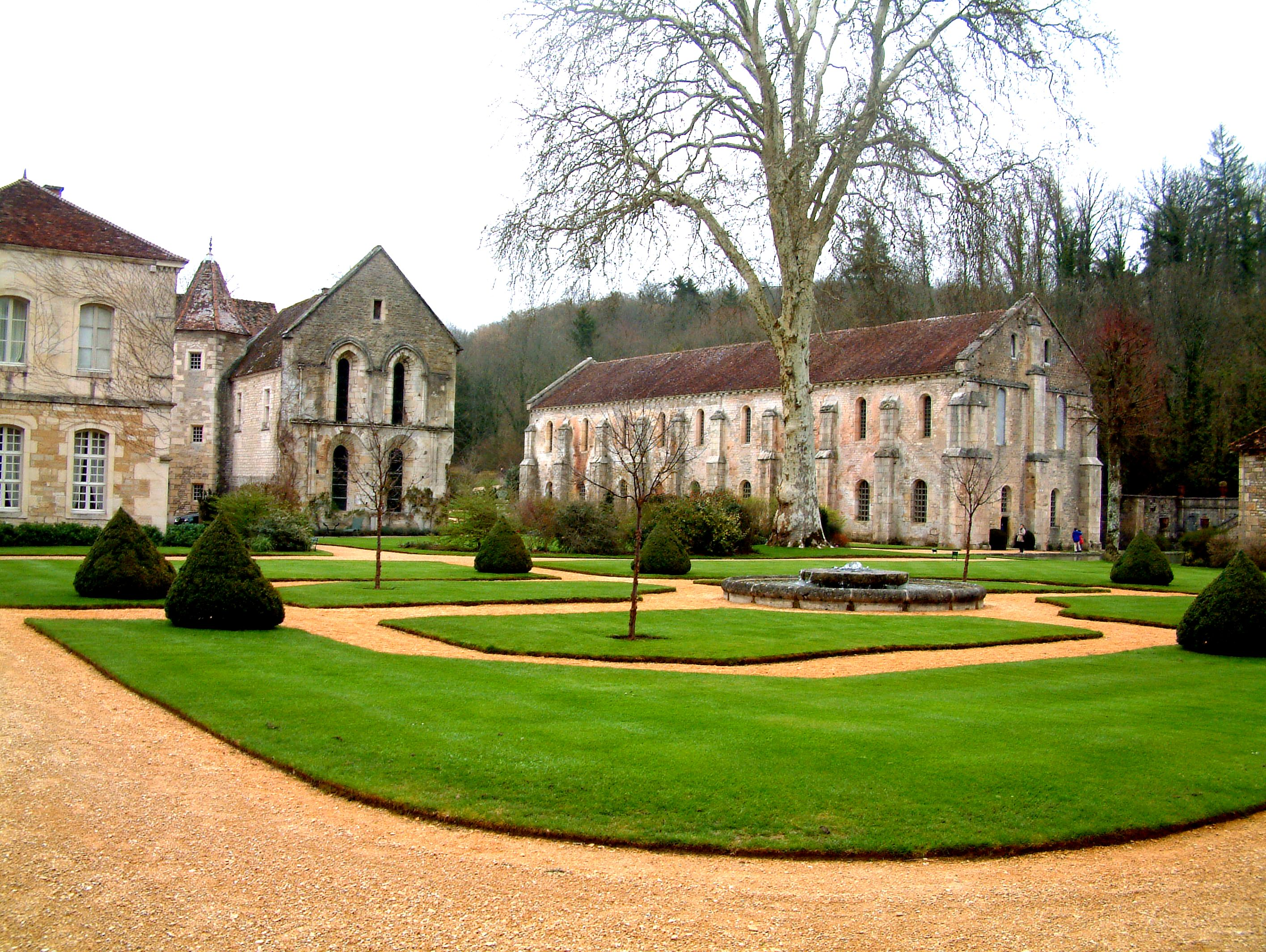 Abadia de Fontenay